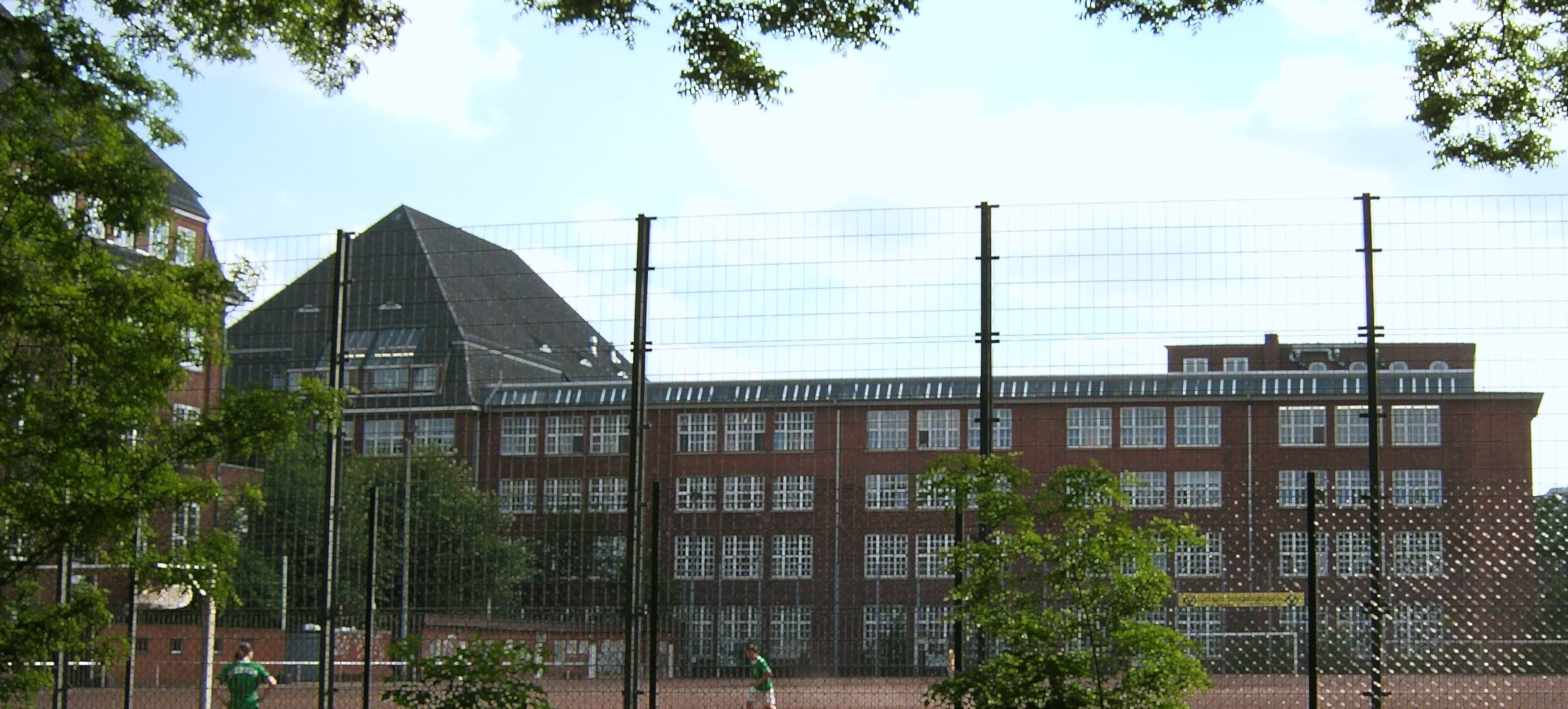 Die Hochschule für bildende Künste auf der Uhlenhorst mit davor liegendem Sportplatz.